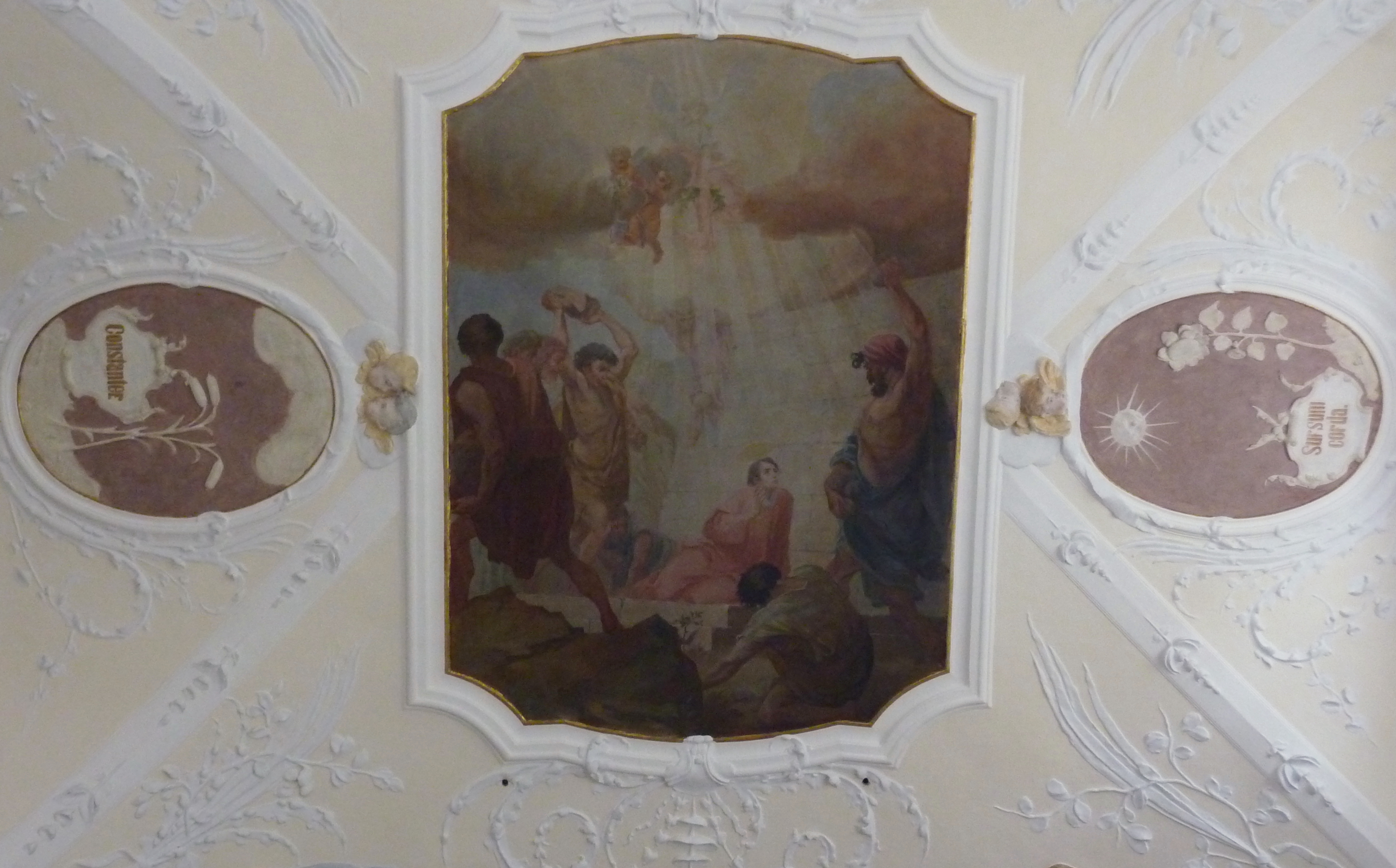 Katholische Pfarrkirche St. Stephanus (Hainhofen) in (Neusäß), Deckengemälde im Chor, Darstellung: Steinigung des hl. Stephanus; Medaillons mit stuckierten Emblemen und Inschrift, links: Schilfkolben und Inschrift „Constanter“ (standhaft), rechts: Sonnenblume und Inschrift „Sursum corda“ (erhebet die Herzen)